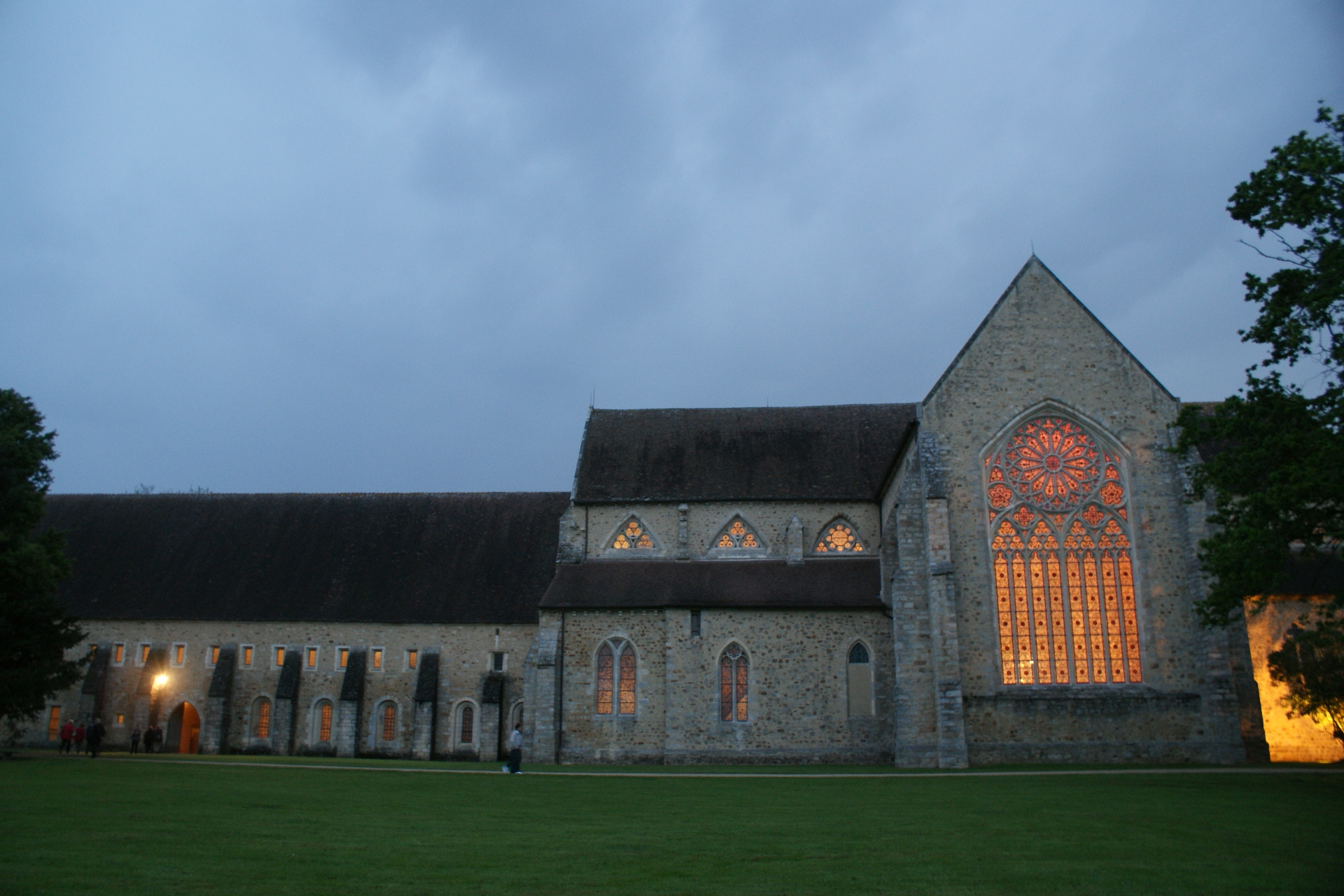 L'abbaye de l'Epau de nuit lors du fameux festival classique de l'Epau.